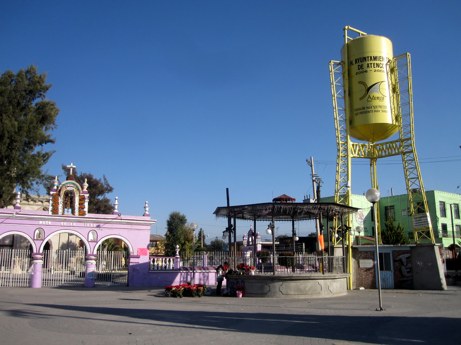 Sentrum av Acuexcomac i Atenco kommune i Mexico